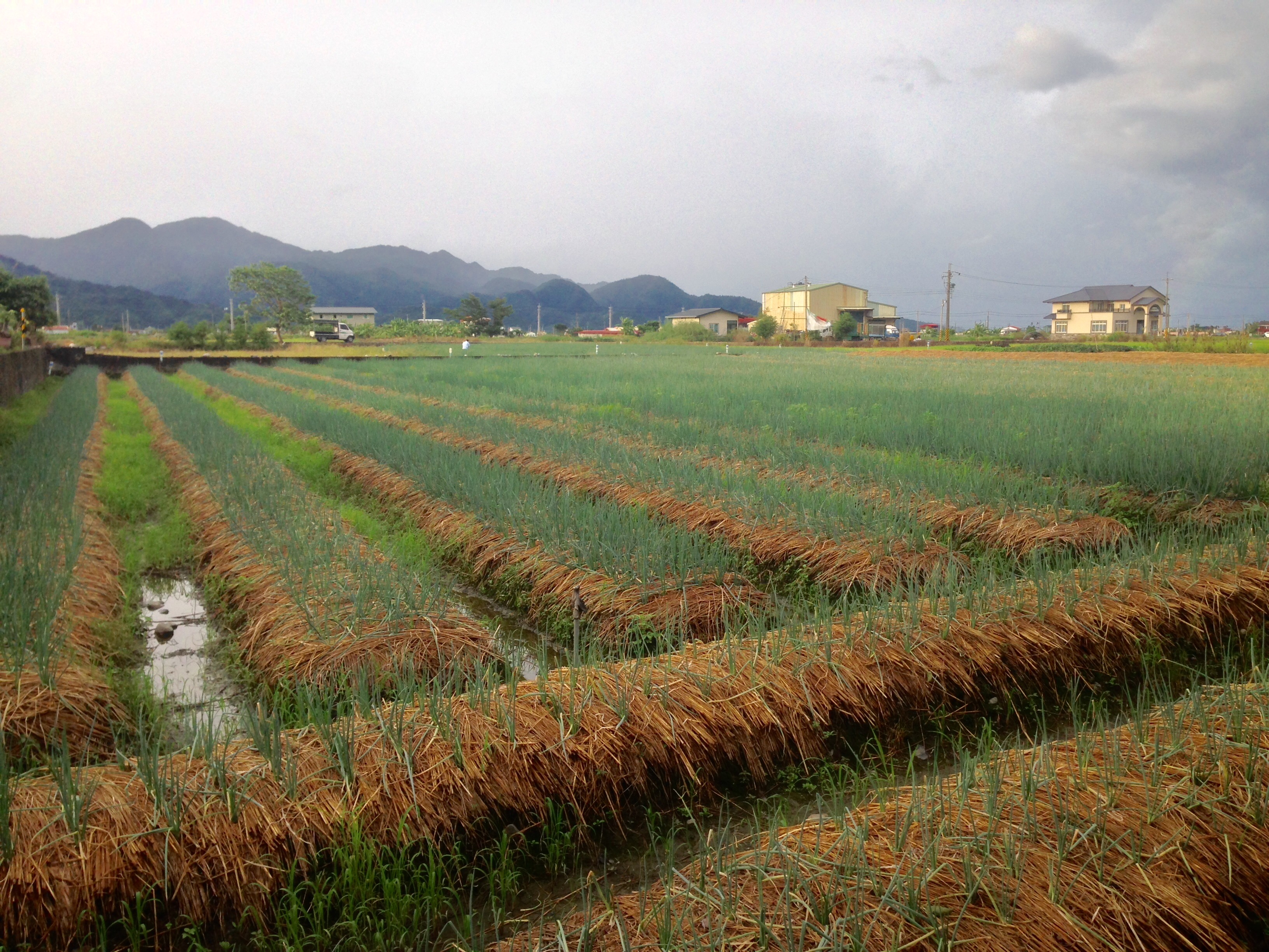 宜蘭縣三星鄉三星蔥田。